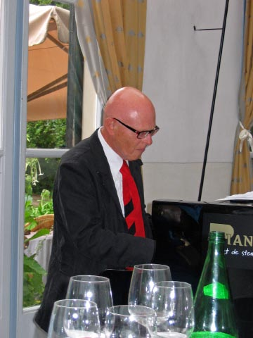 Foto van Joop Stokkermans achter de piano op 80e verjaardag van Dick Bruna